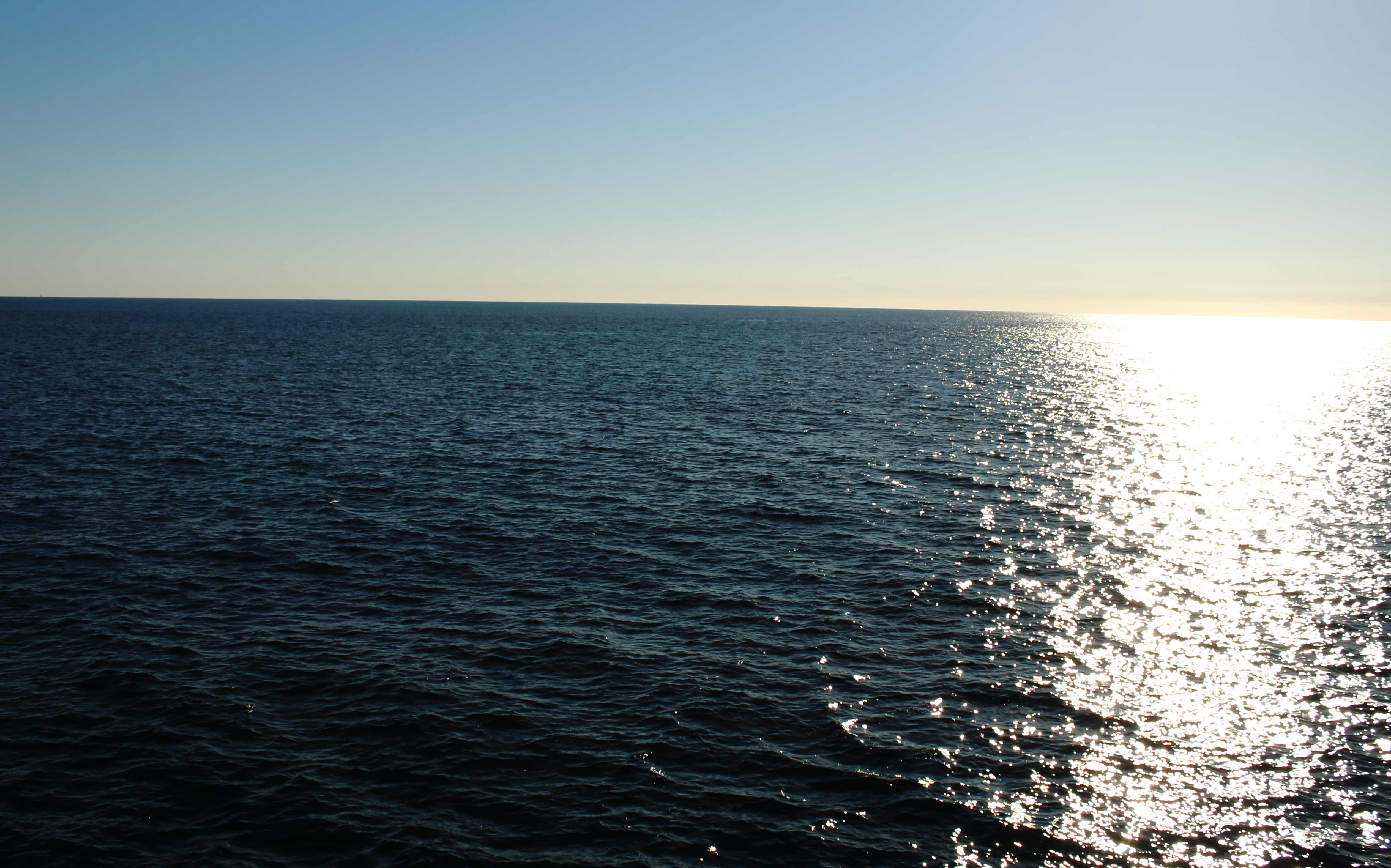 Vista del mar desde la playa de Newport, California, Estados Unidos.